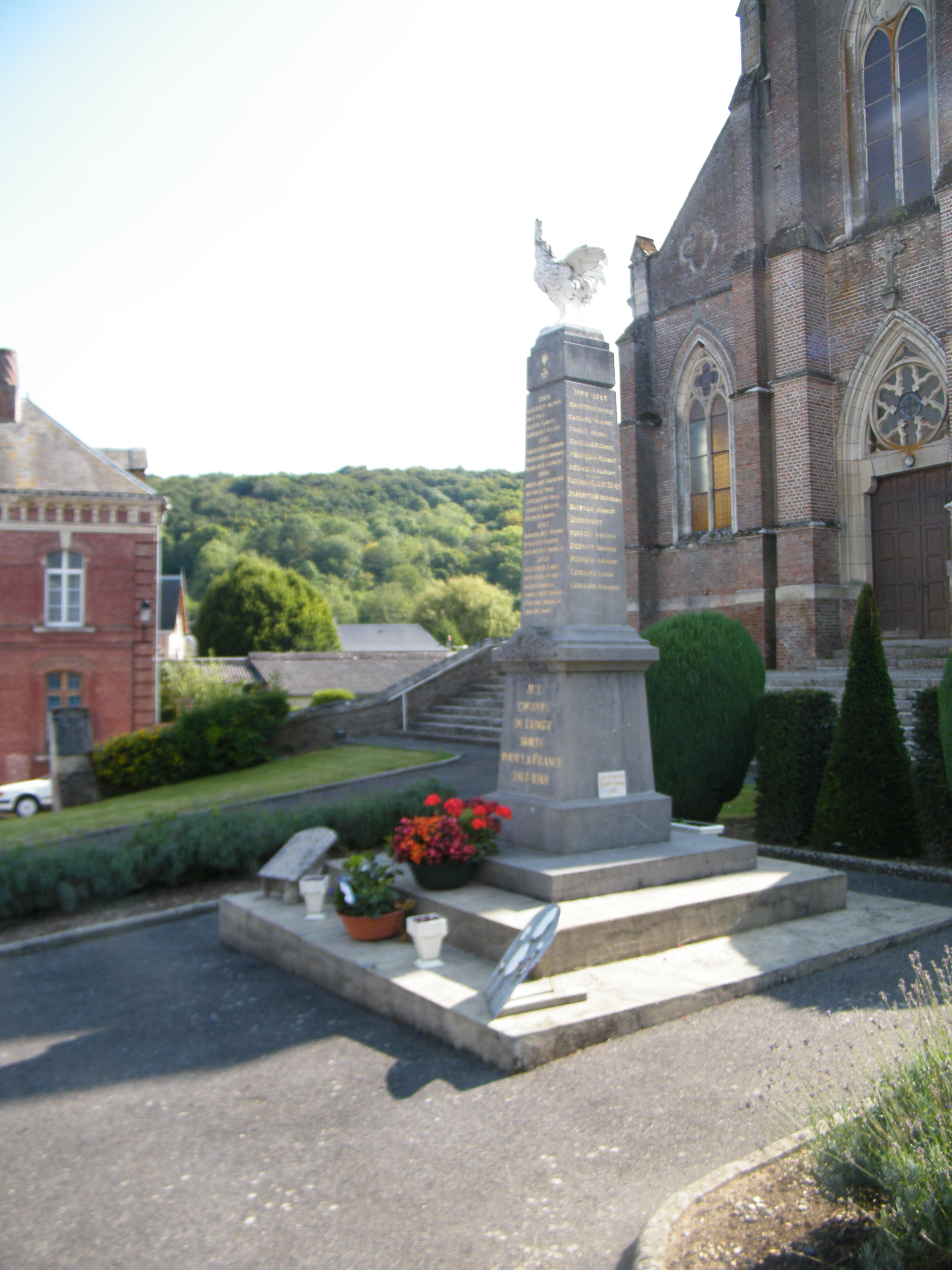 Monument surmonté du coq gaulois.